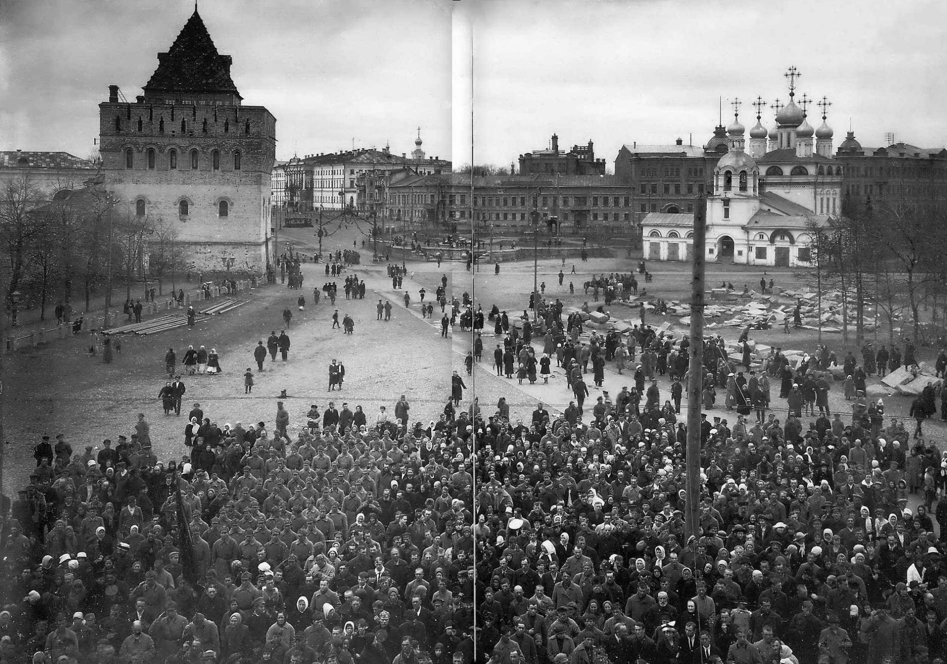 Начало Октябрьской революции в Нижнем Новгороде на Благовещенской площади